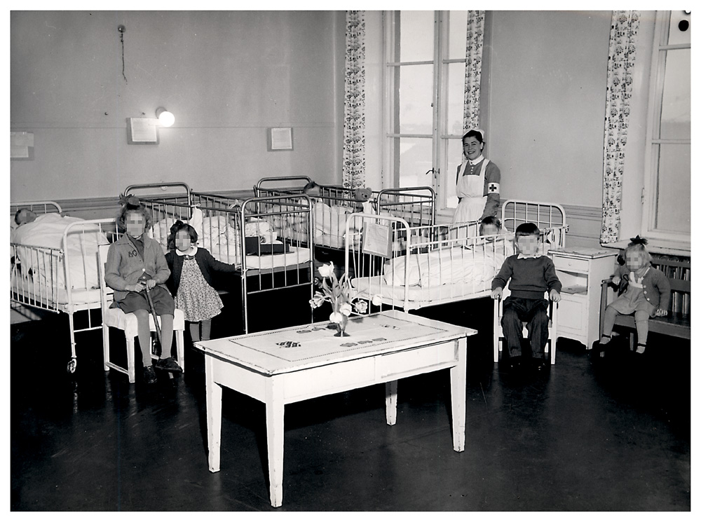 Polio førte til lange sykehusopphold for mange små barn. Arkivet etter Rikshospitalet, Sophies Minde, Riksarkivet.